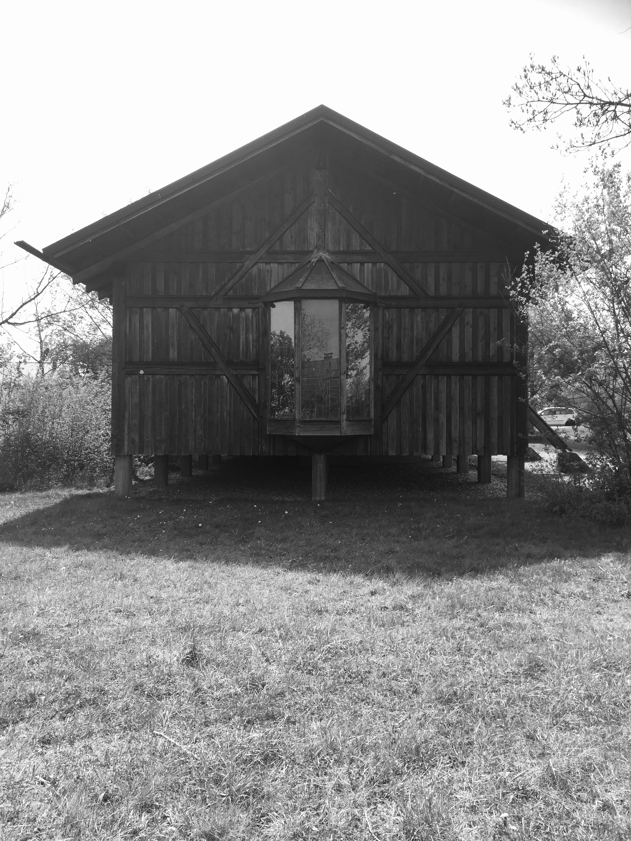 Holzbau